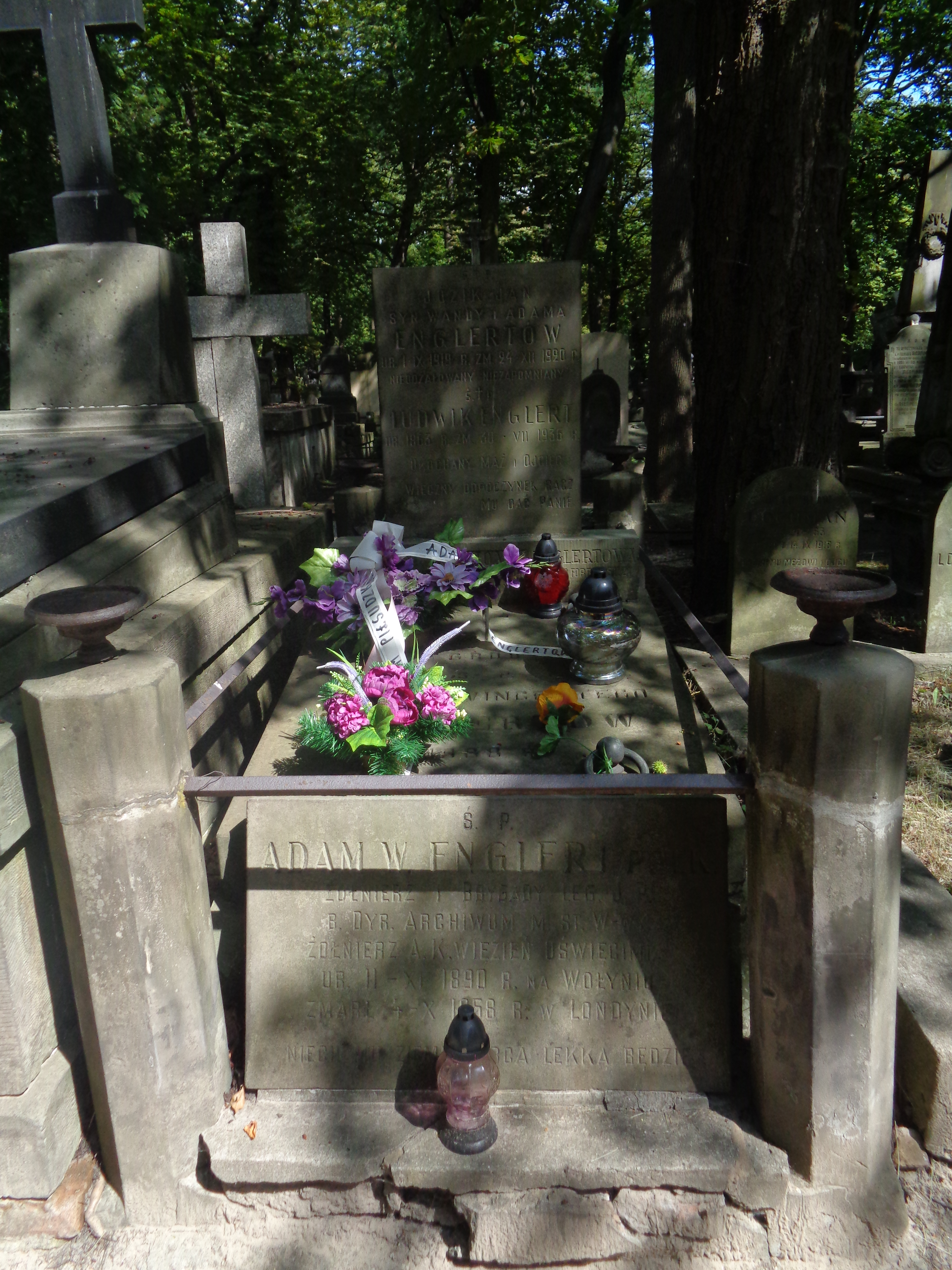 Grób Adama Englerta